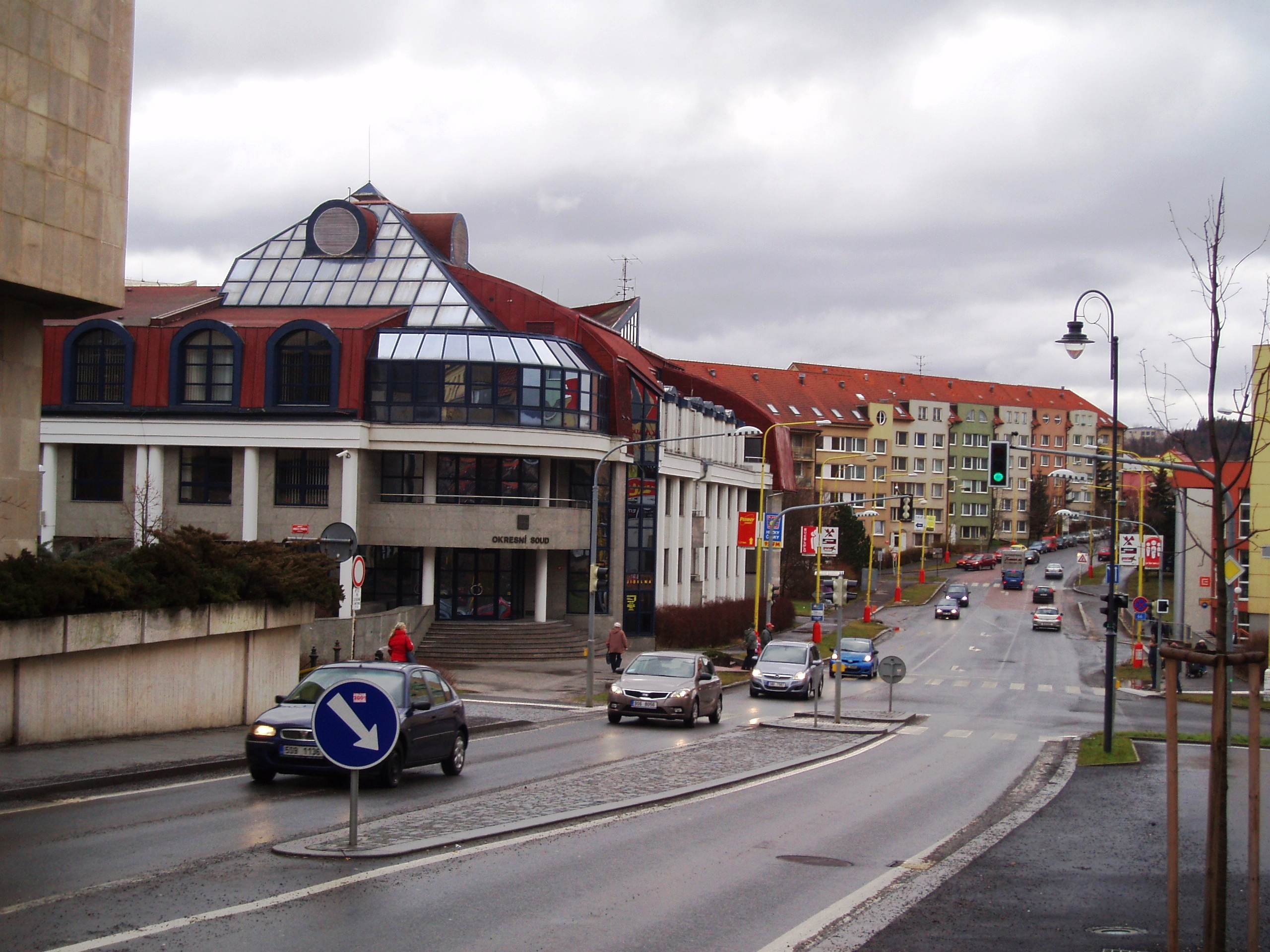 PB III - okresní sou a Milínská ulice